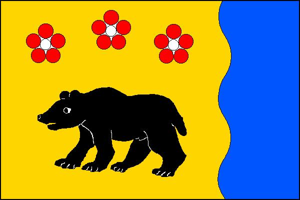 Vlajka obce Písečná (okres Jeseník)